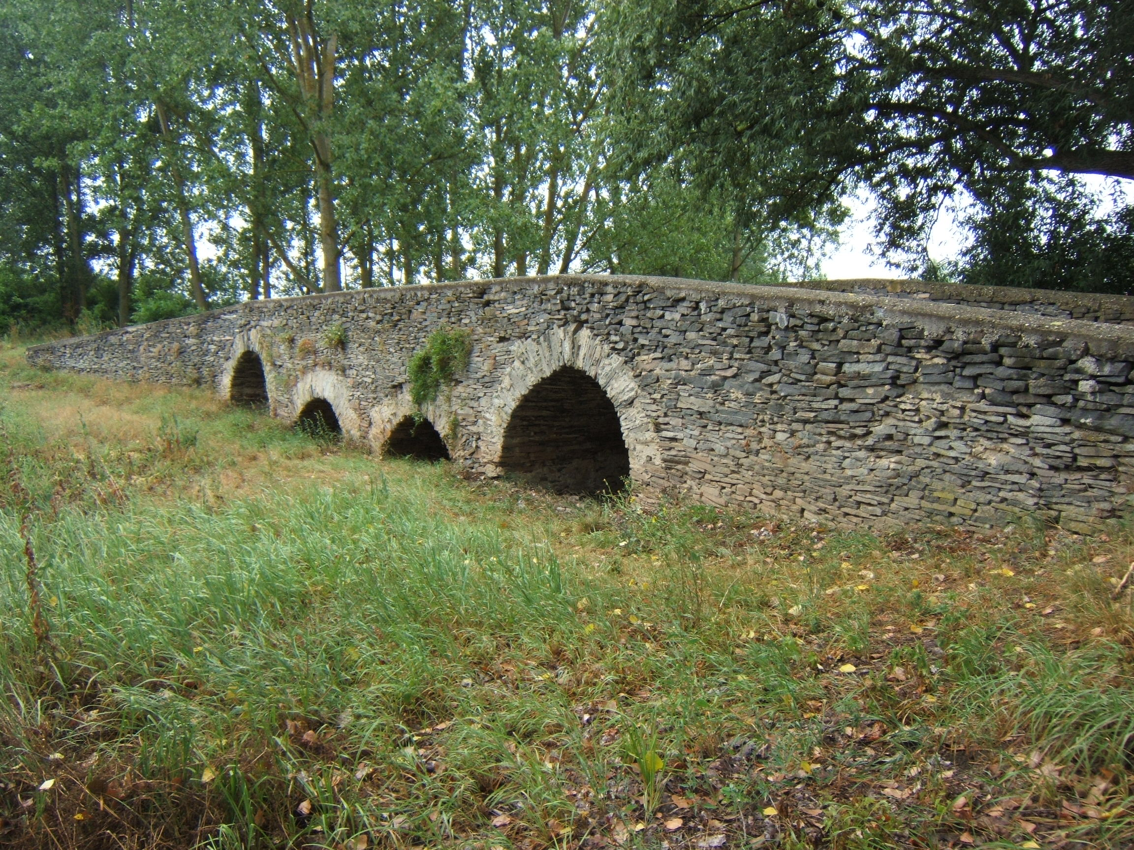 Lelesz, Szent Gotthárd híd